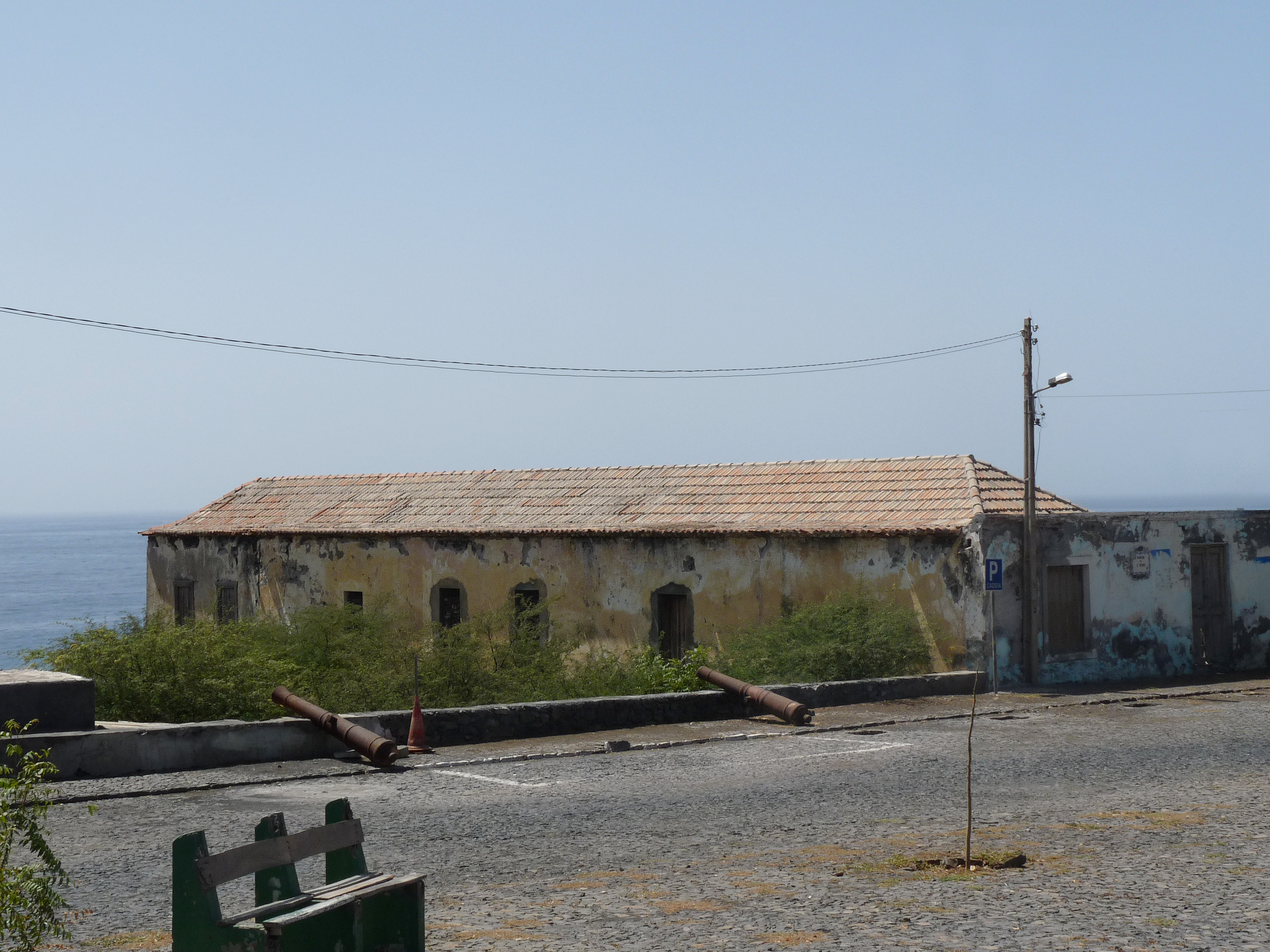 São Filipe (île de Fogo, Cap-Vert) : ancienne forteresse Fortim Carlota, qui a fait office de prison